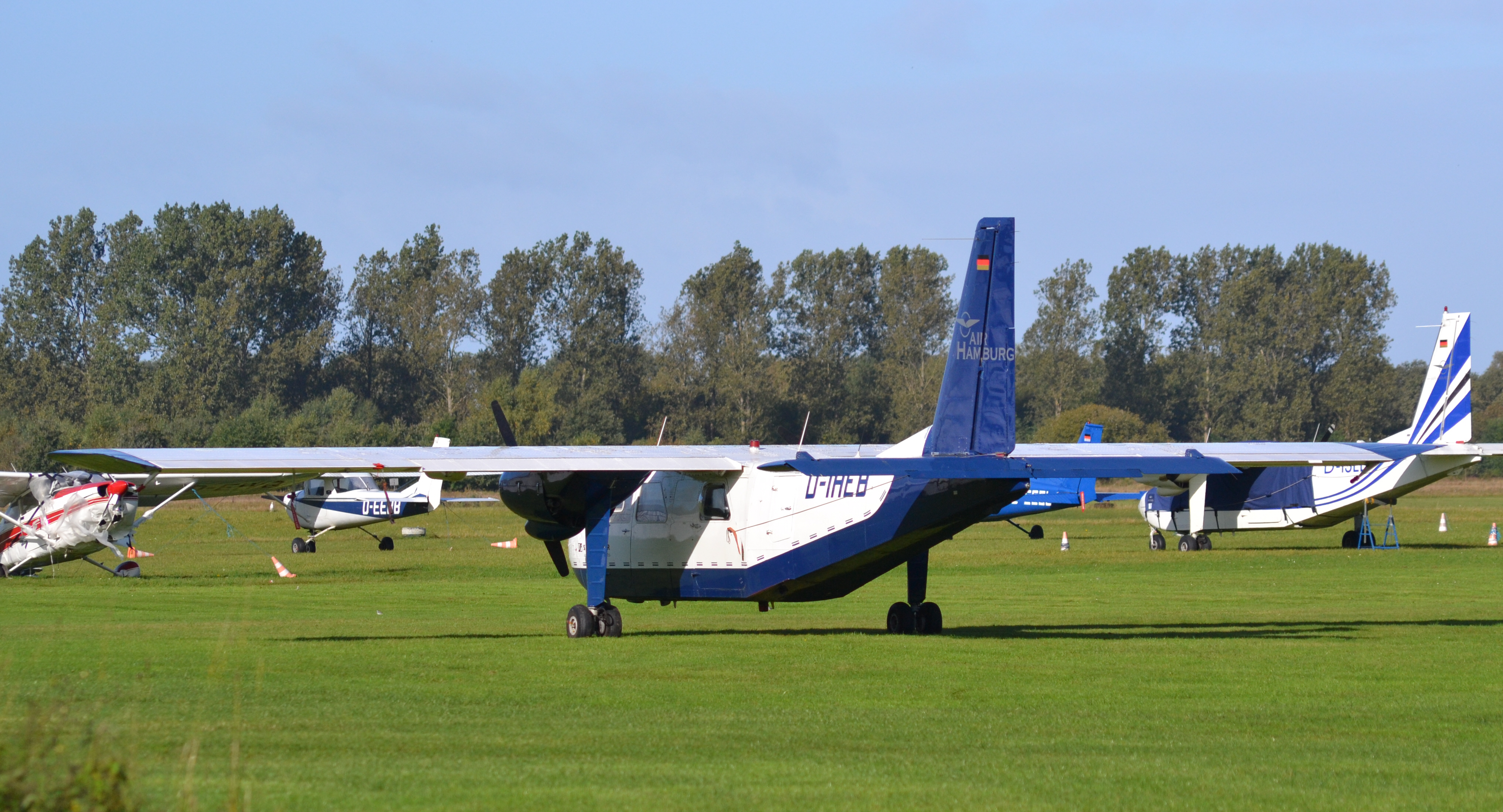 Britten-Norman BN-2A Islander (D-IAEB) auf dem Flugplatz Uetersen